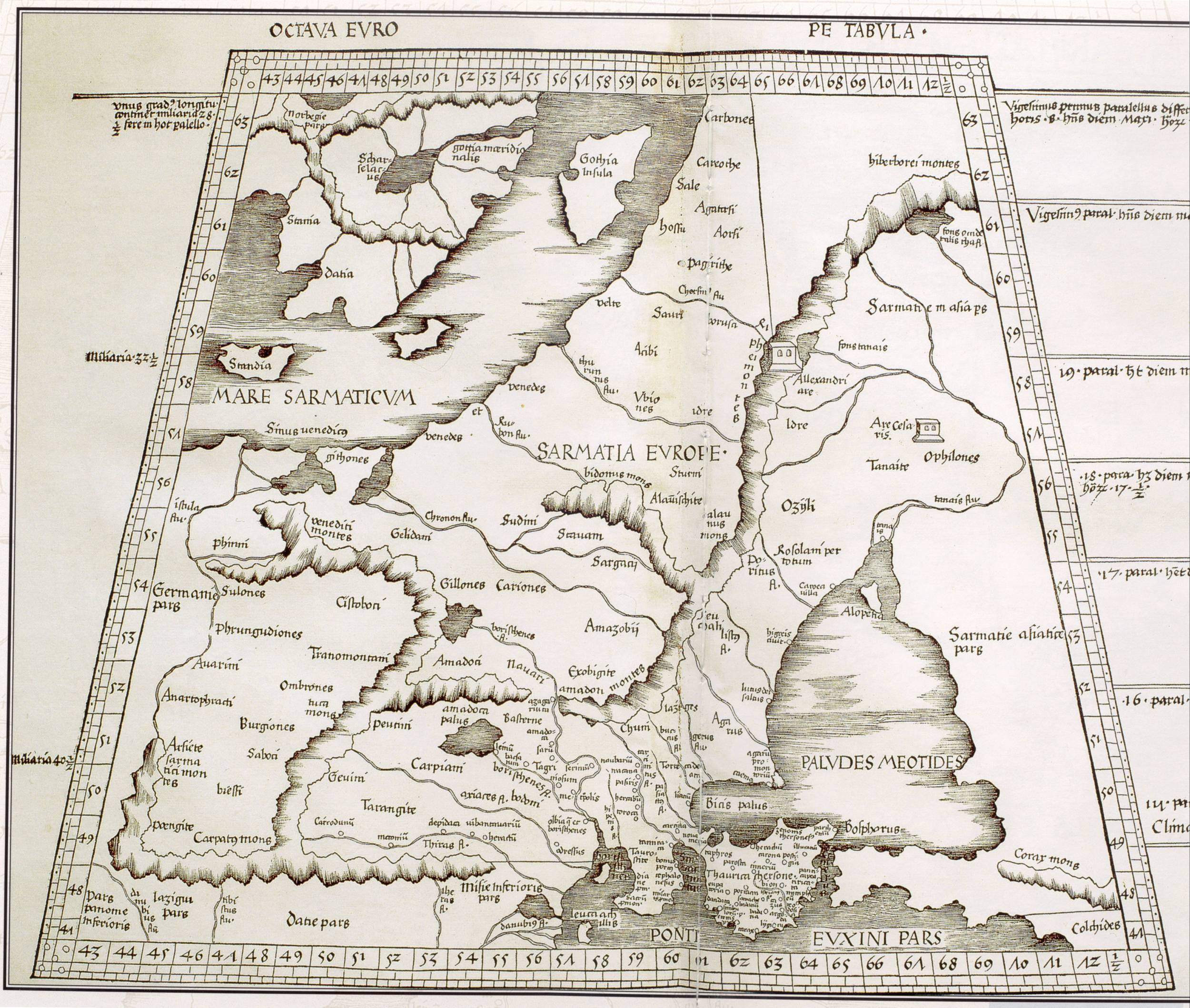 Клавдий Птолемей, "Восьмая карта Европы".